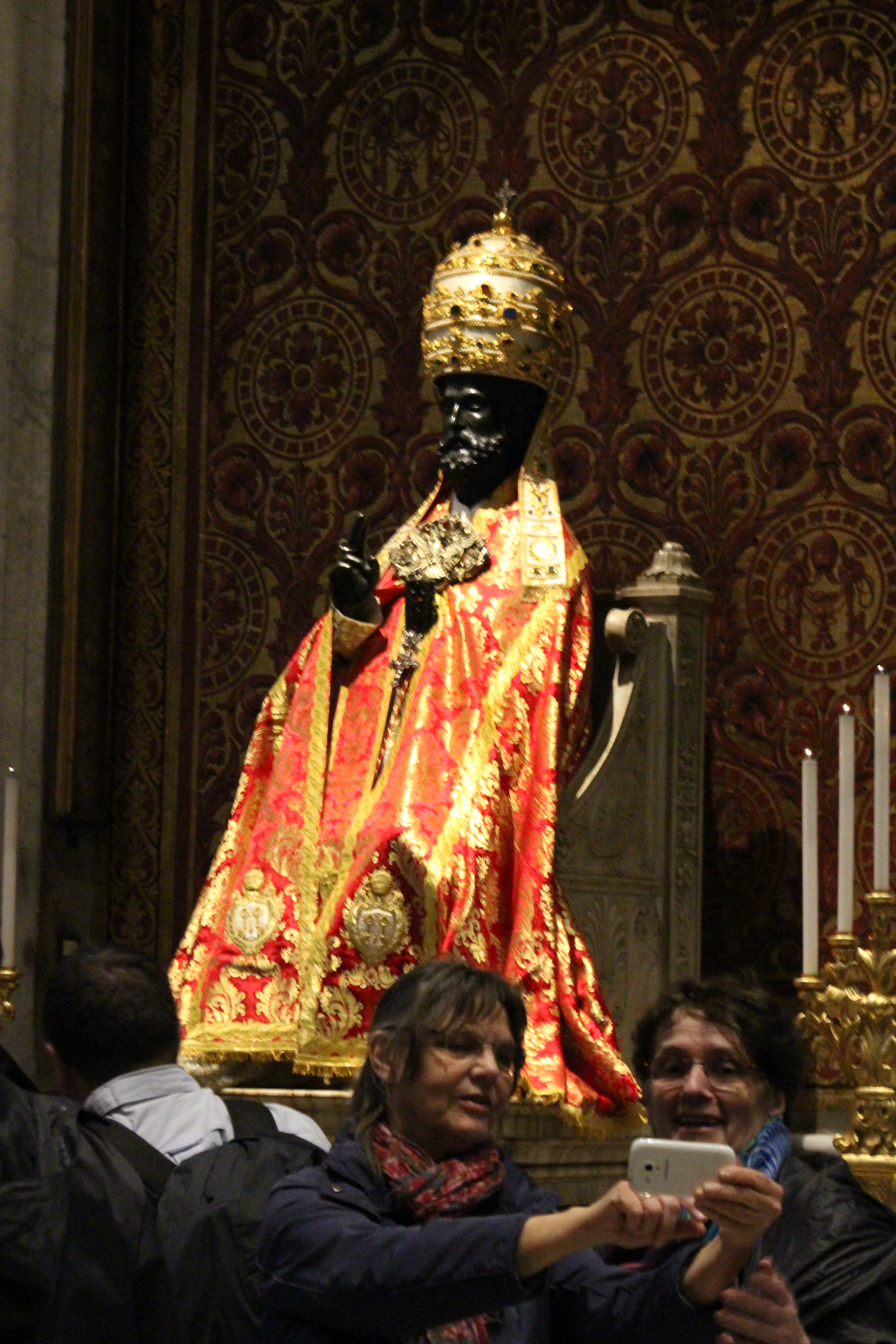 Die Statue des hl. Petrus in festlicher Bekleidung anlässlich des Festes Kathedra Petri im Petersdom (Rom)